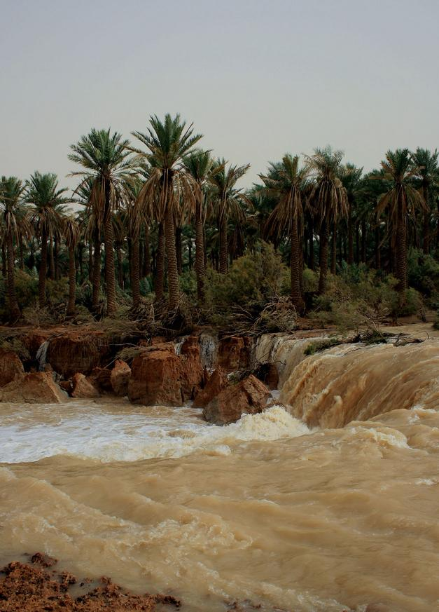 Rumah Valley